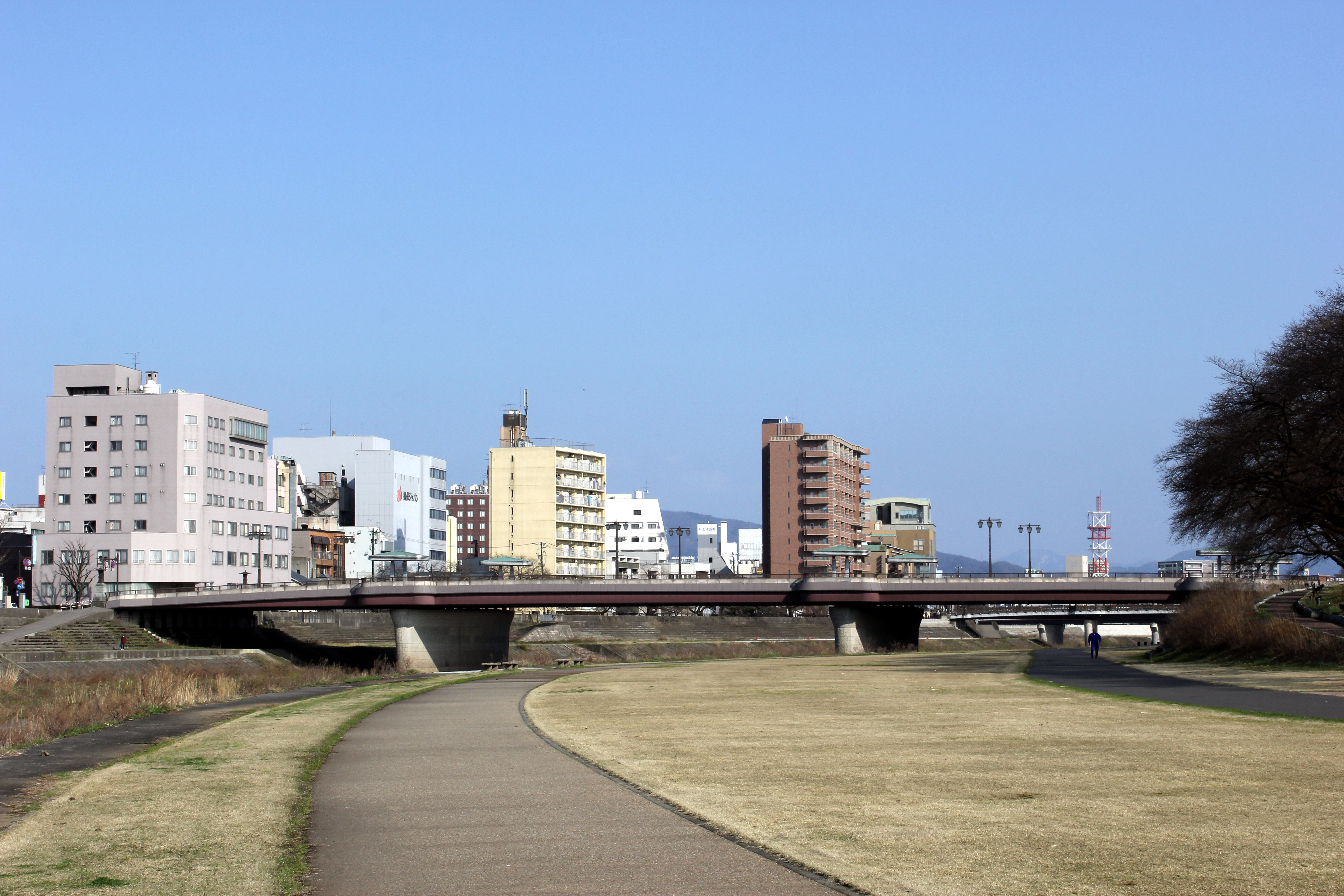 九十九橋（福井県）